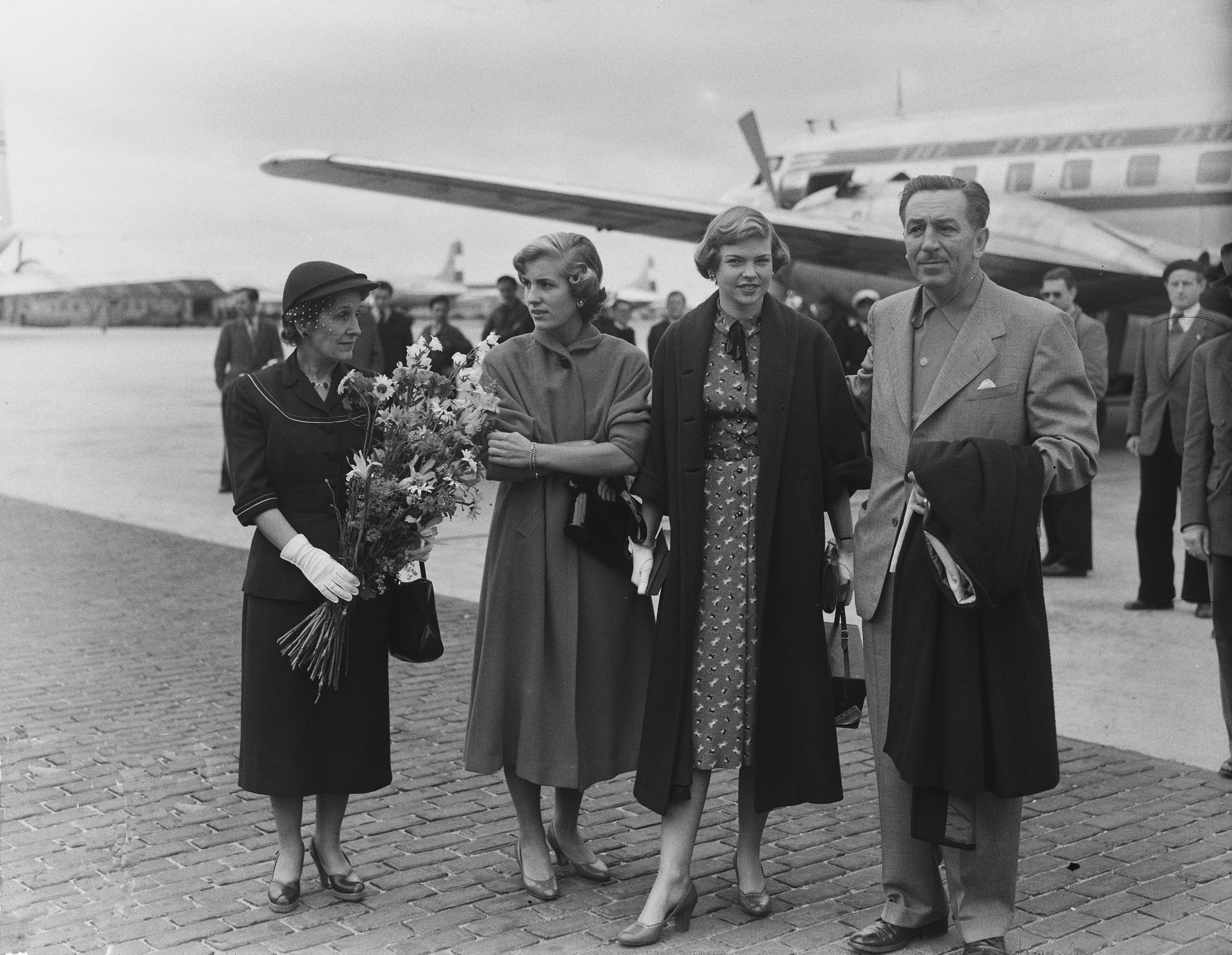 Bezoek Walt Disney aan Amsterdam. Aankomst Walt Disney op Schiphol, met echtgenote Lilian en twee dochters Sharon en Diane